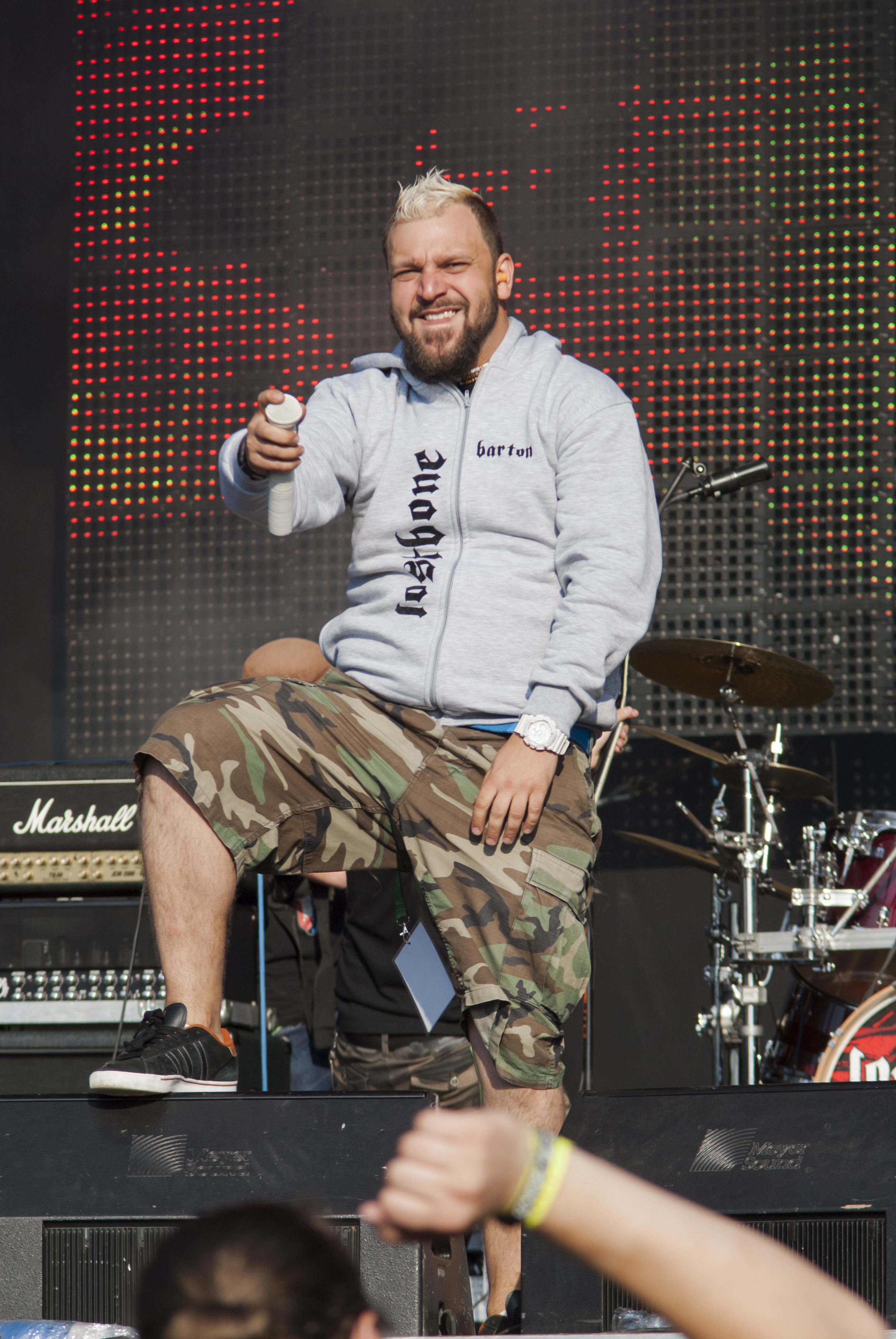 Bartosz "Barton" Szarek podczas festiwalu Ursynalia 2013